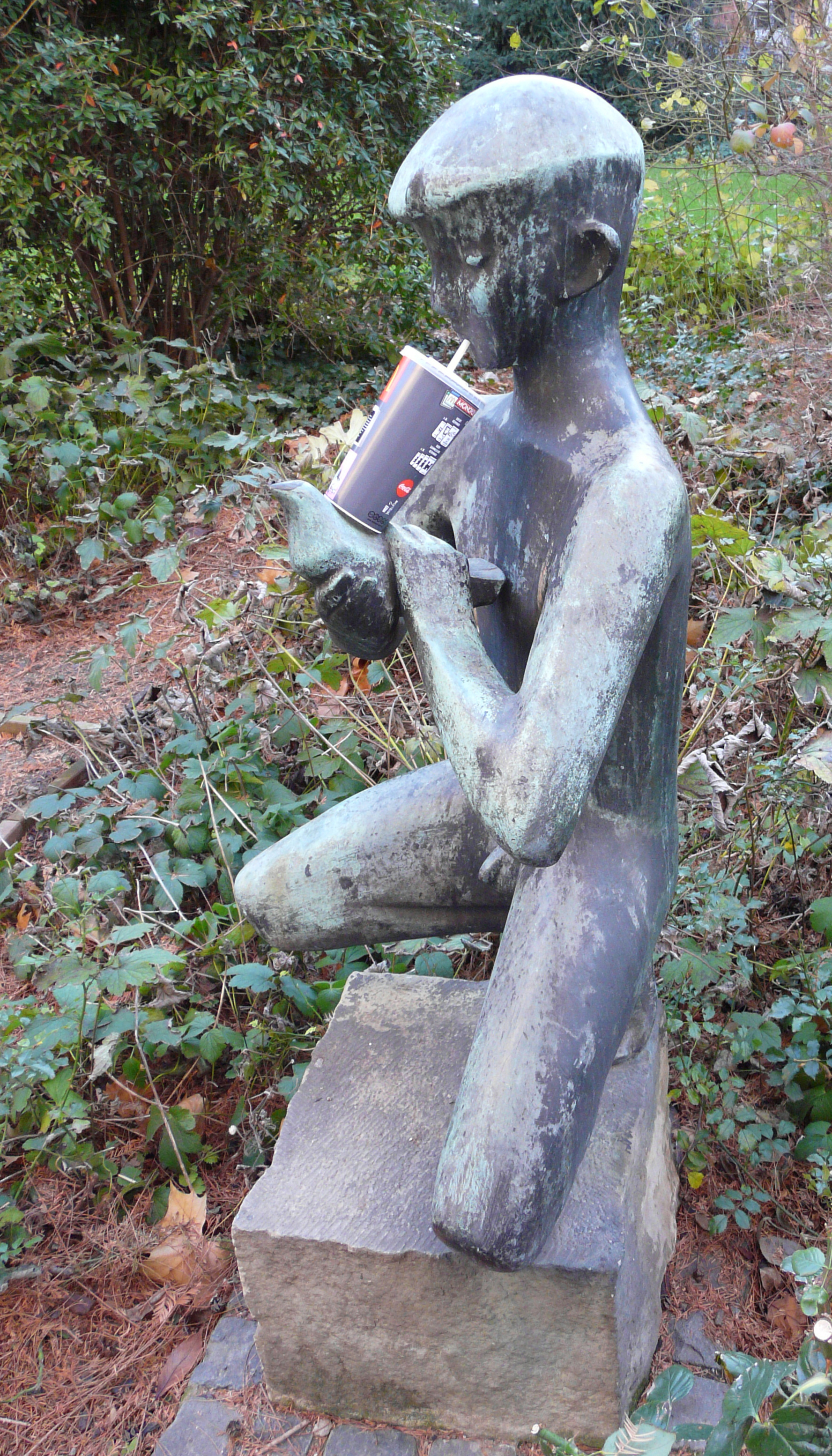 Bildinhalt: Bronzefigur "Knabe mit Taube" von Hermann Geibel auf dem Scipioplatz mit Trinkbecher als ironische Beigabe Aufnahmeort: Mannheim, Deutschland